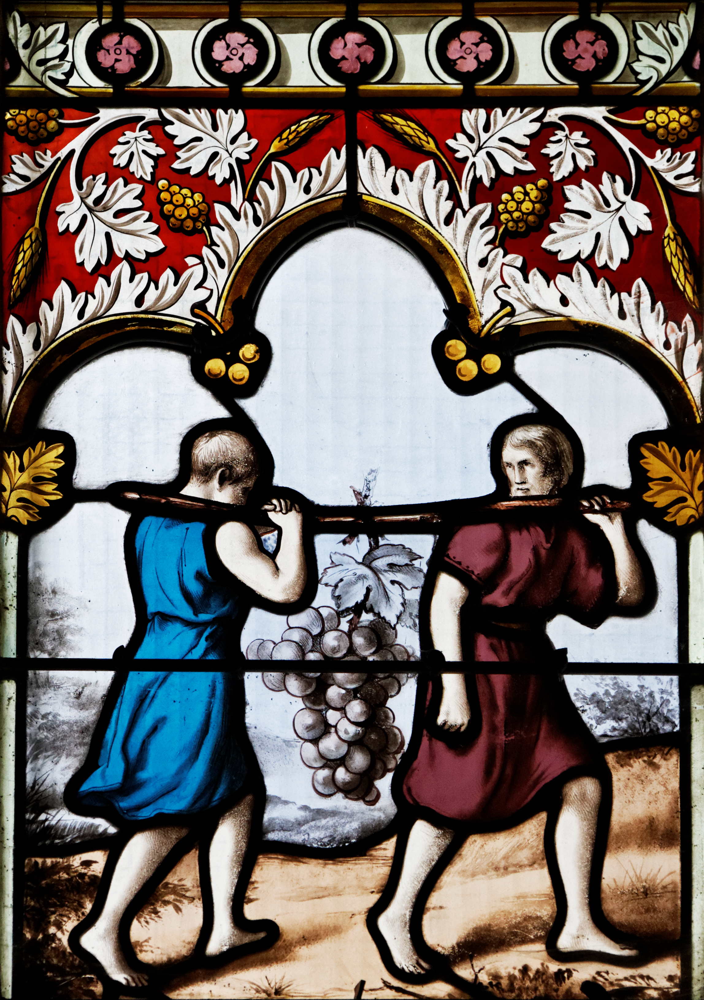 La cathédrale Saint-Corentin à Quimper dans le Finistère.